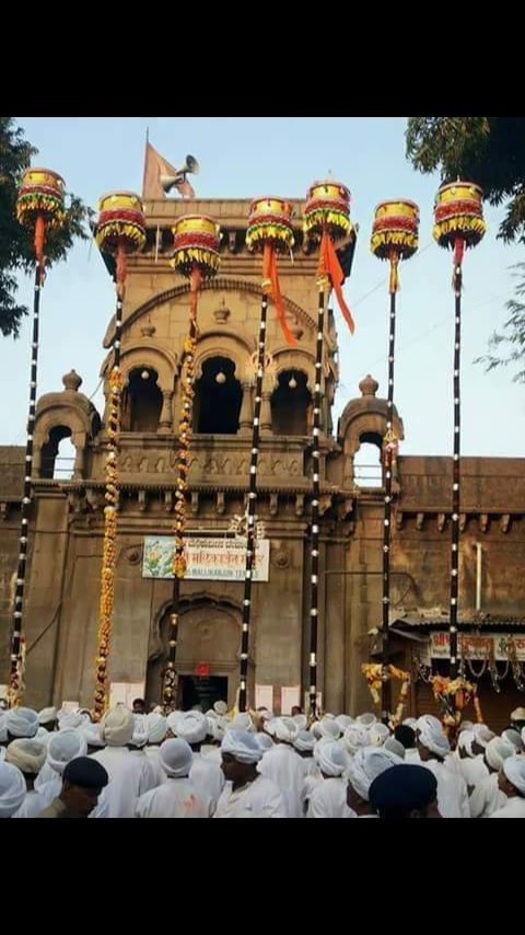 shidheswar